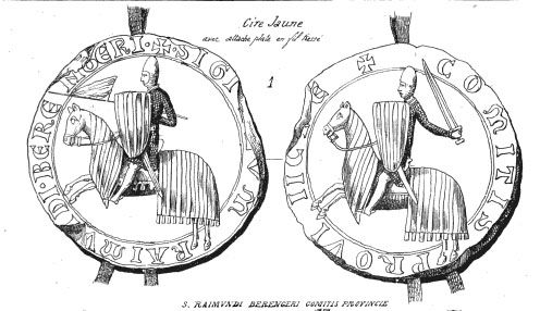 Segell de 1241 del comte Ramon Berenguer V de Provença (1200-1245). (anvers i revers)